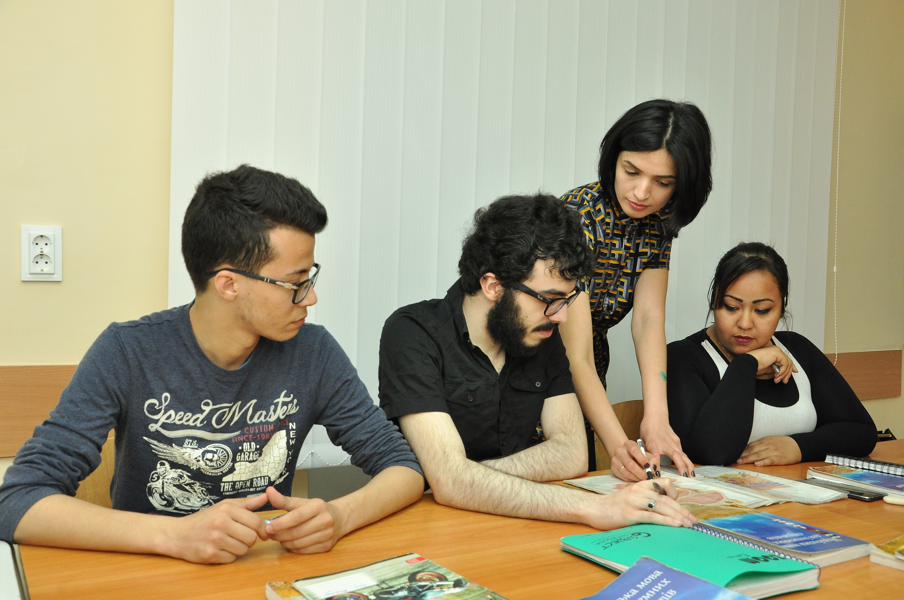 Підготовче відділення для іноземців та осіб без громадянства Тернопільського державного медичного університету імені І. Я. Горбачевського. Урок біології проводить Оксана Гром.